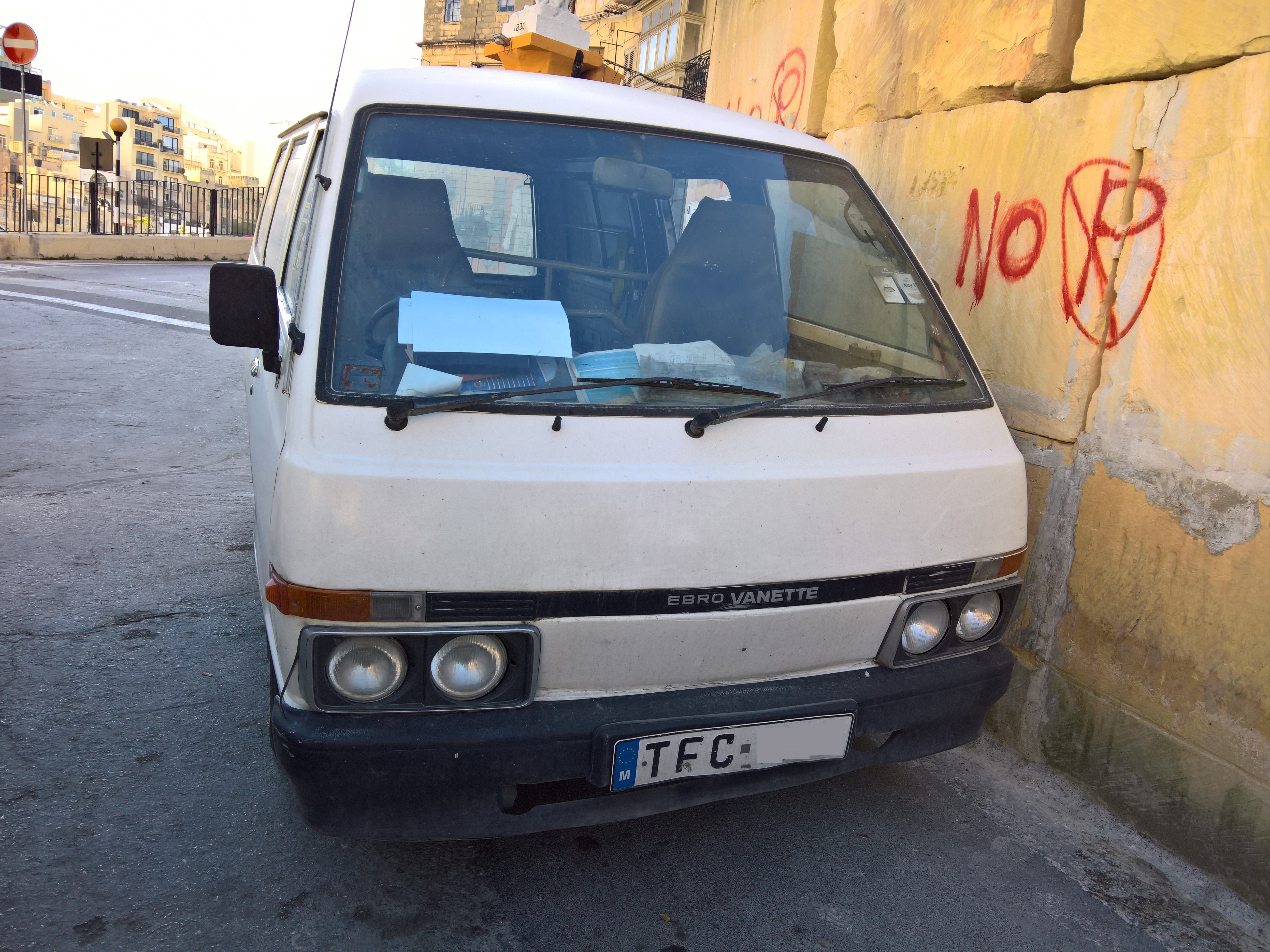 Ebro Vanette in St. Julians, Malta